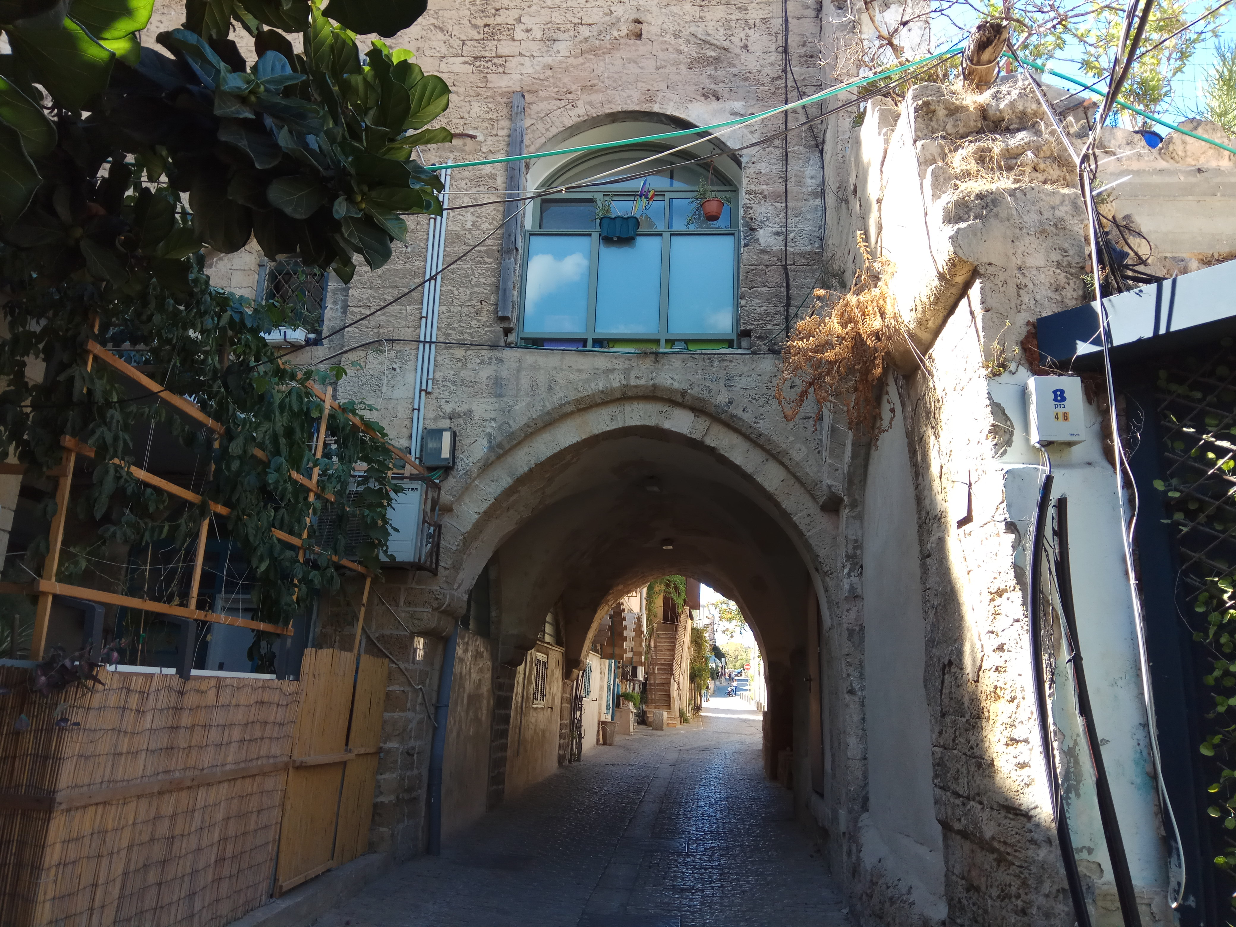 רחוב הצורפים ביפו העתיקה